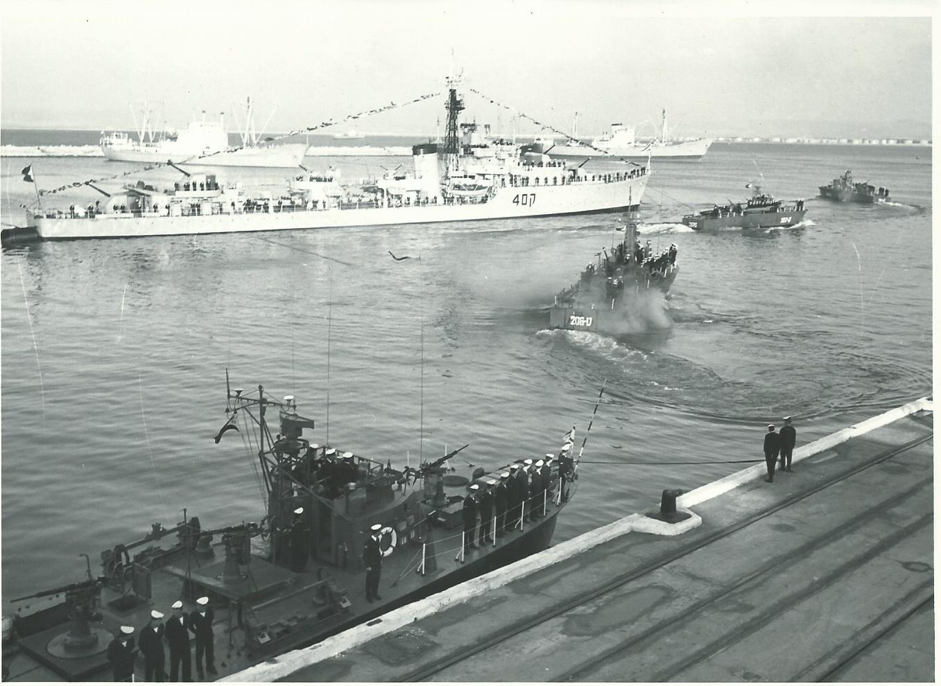 ספינות פלגת הטרפדות במסדר חילי לקבלת פנים לצוללת אח"י תנין בנמל חיפה